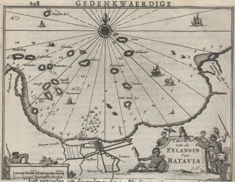 Illustration from Joan Nieuhof (1682): Zee en lantreize, door verscheide gewesten van Oostindien. Part 2 of Gedenkwaerdige zee en lantreize